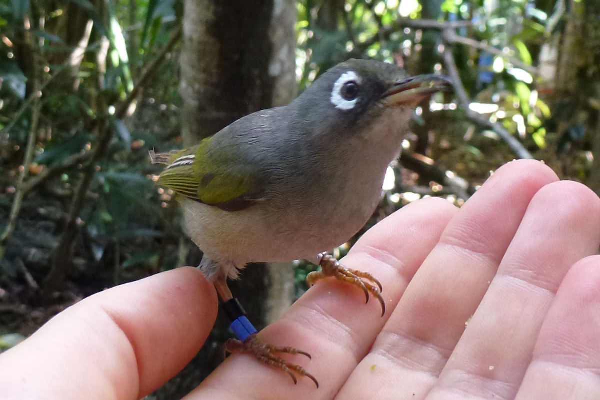 A male bird with strange behaviour (tame)